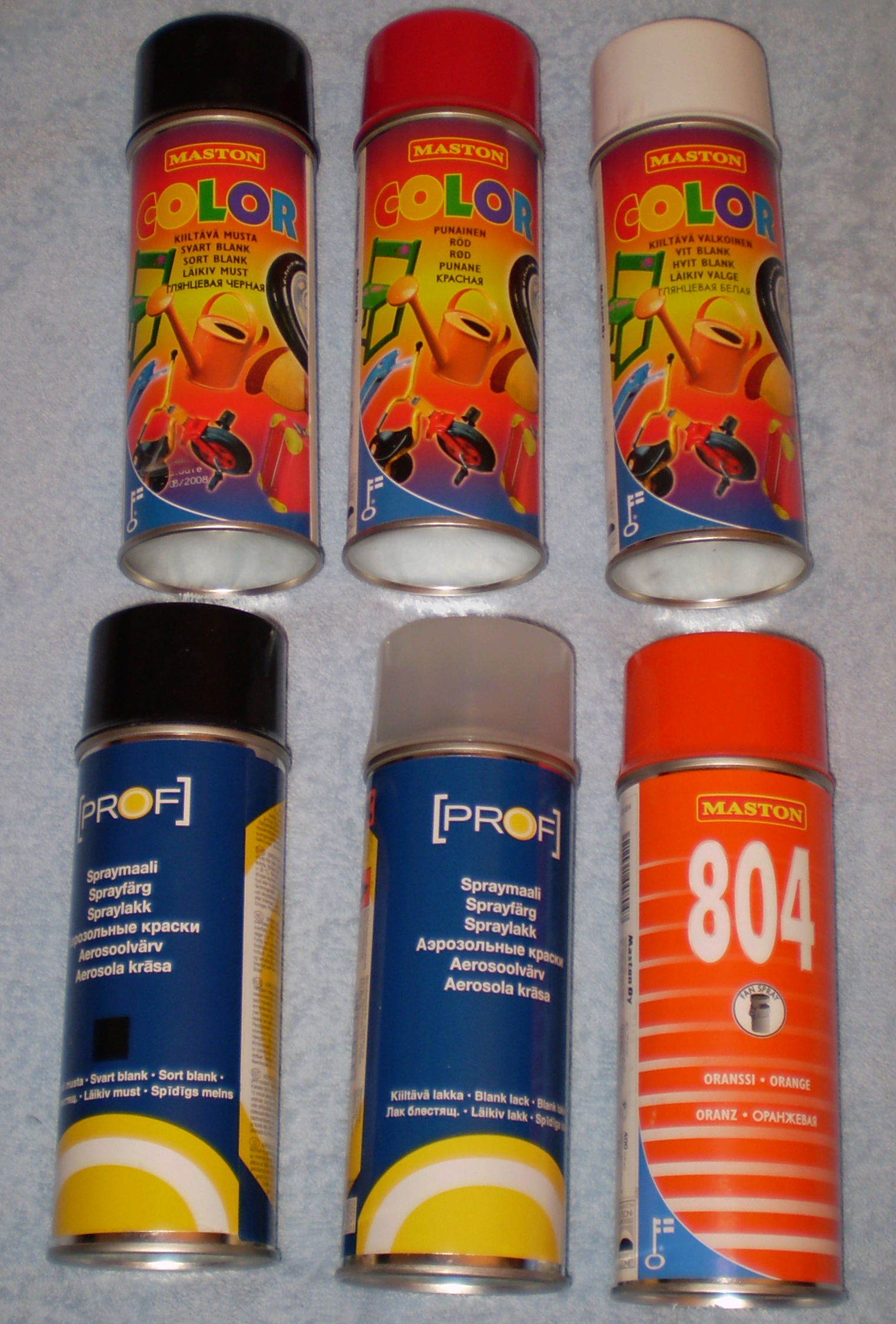 Spraymaalipurkkeja